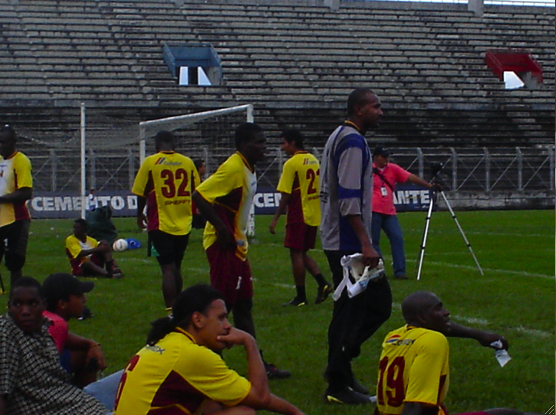 Entrenamiento Deportes Tolima. Estadio Manuel Murillo Toro. Abril 20/06